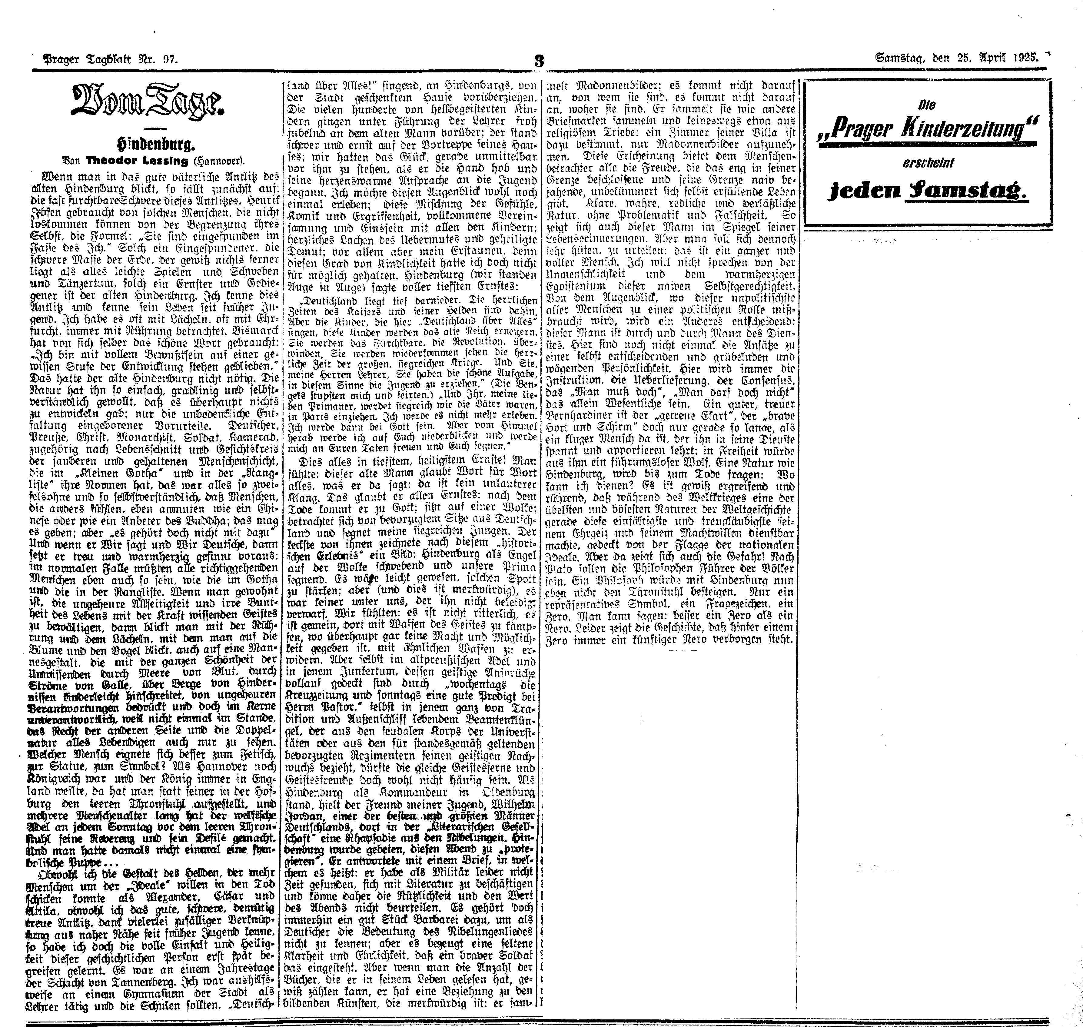 Hindenburg. In: Prager Tageblatt, 25. Februar 1925, S. 3